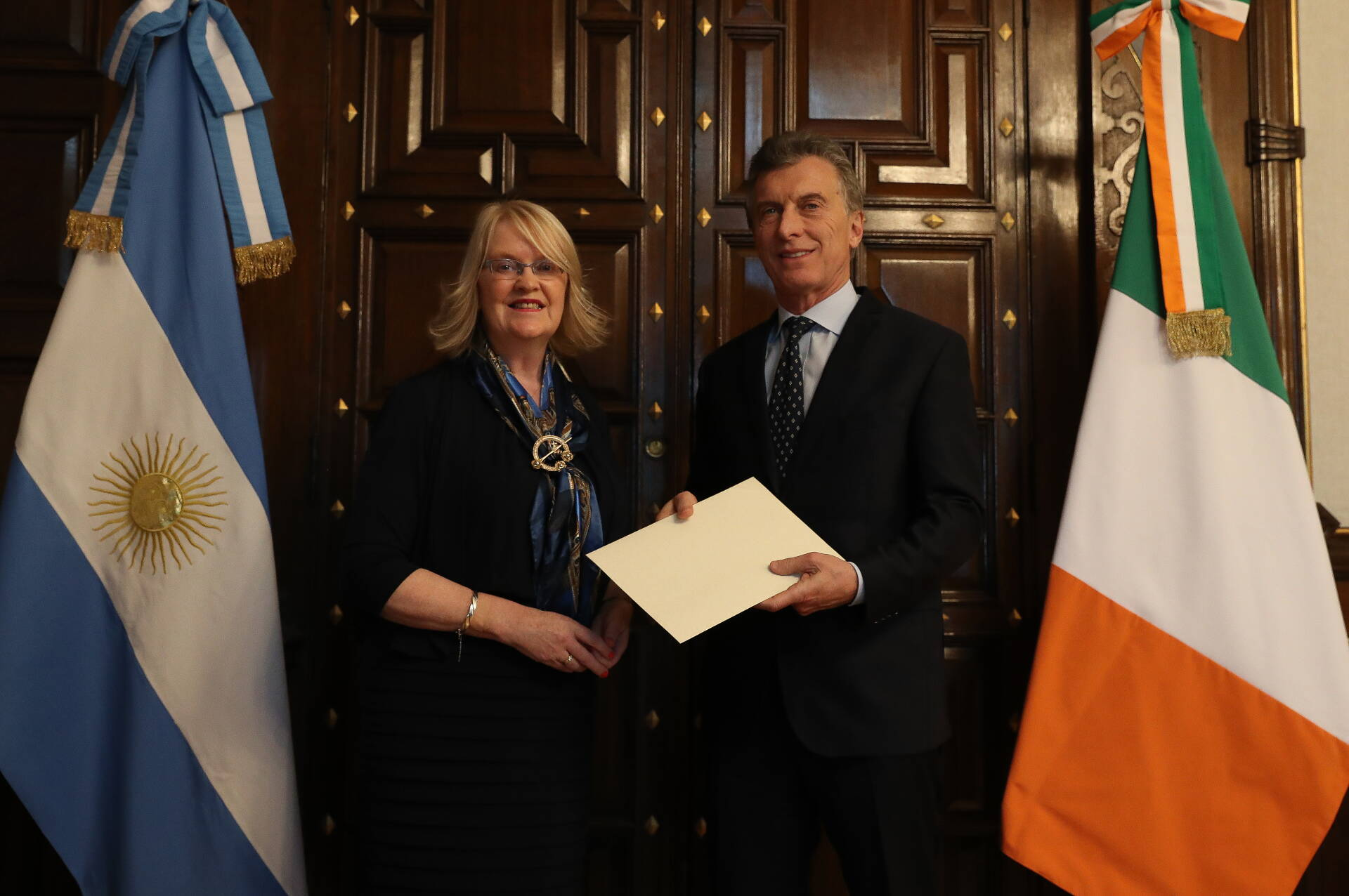 El presidente Mauricio Macri recibió en su despacho de la Casa Rosada las cartas de credenciales de los nuevos embajadores de Rusia, Dmitriy Feoktistov; de los Países Bajos, Roel Nieuwenkamp; de Irlanda, Jacqueline O’Halloran, y de Filipinas, Lingglingay Lancanlale.